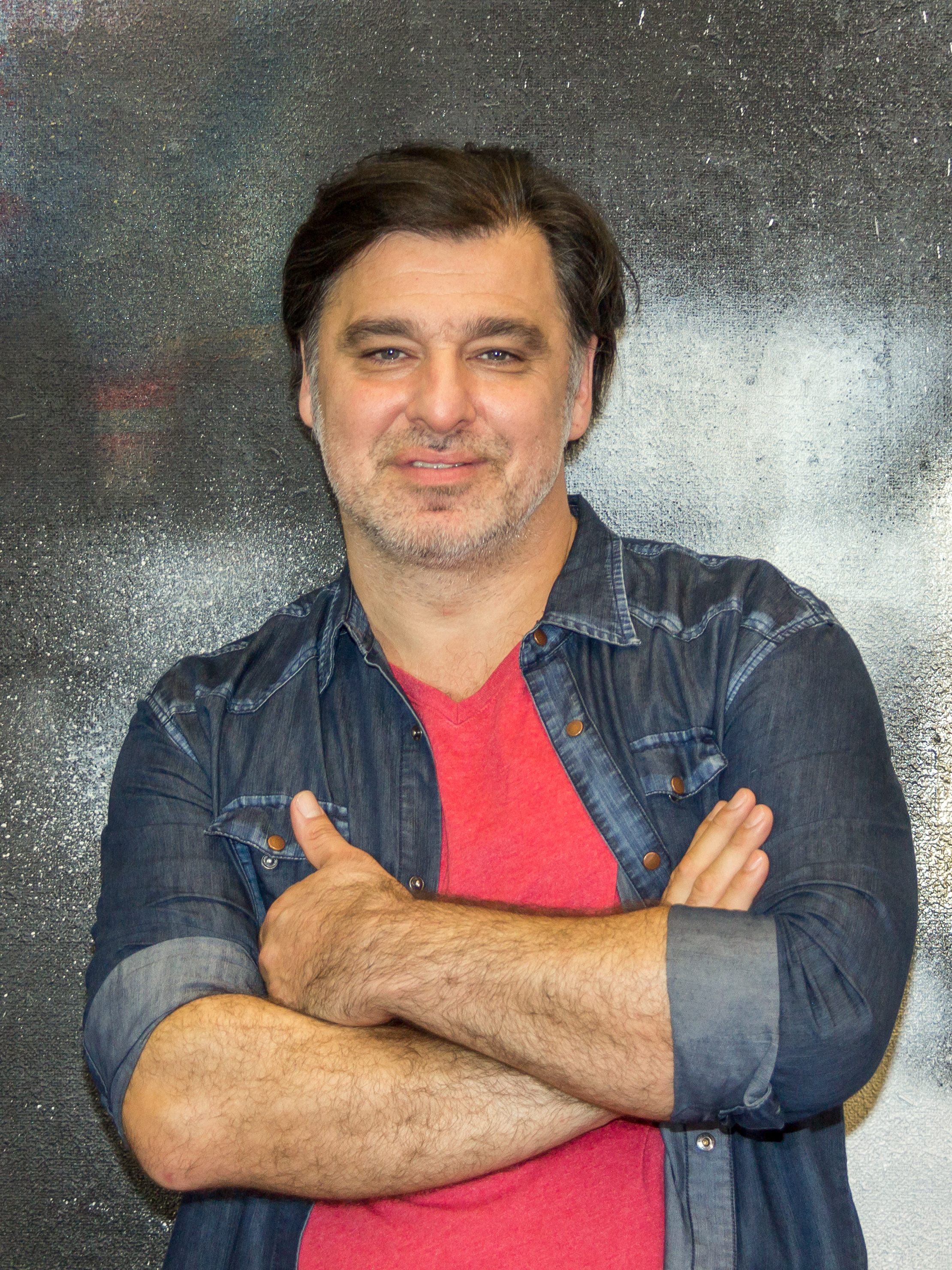 Pressetermin 30 Jahre Lindenstraße - Erkan Gündüz in der Rolle des „Murat Dağdelen“